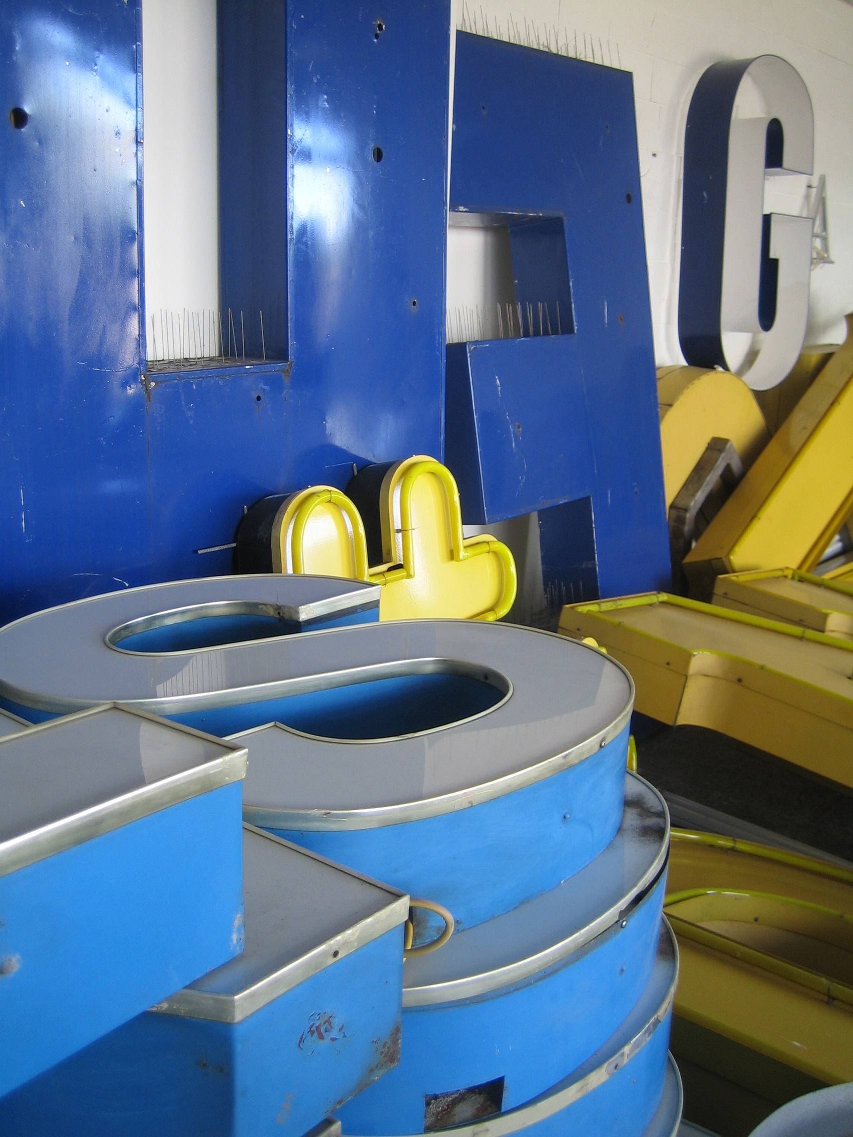 Buchstabenmuseum Berlin, ein Projekt zur "Bewahrung und Dokumentation Von Buchstaben und Zeichen", hauptsächlich von dreidimensionalen Objekten aus dem öffentlichen Raum (Gebäudebeschriftungen usw.). Teilansicht des so genannten Schaudepots.